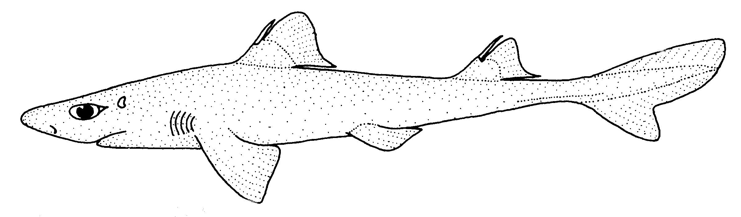 Squalus blainville (Longnose spurdog)